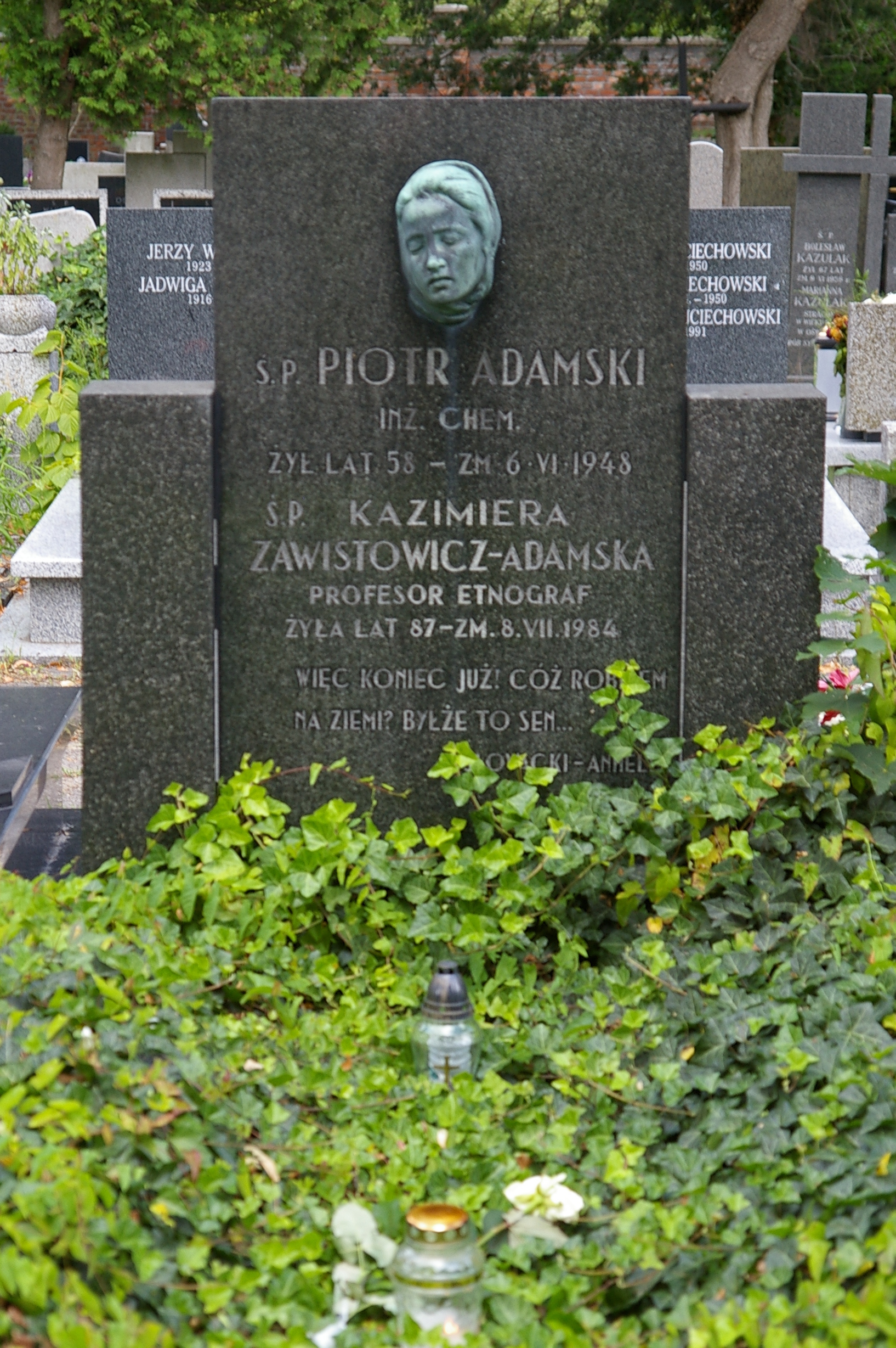 Grób prof. Kazimiery Zawistowicz-Adamskiej na Starym Cmentarzu w Łodzi